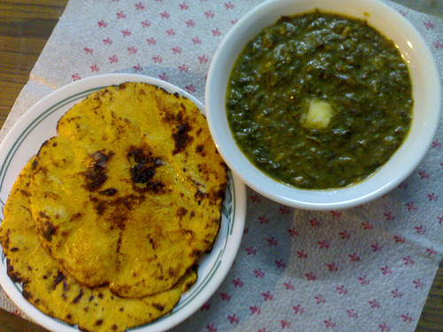 Makki di roti with saag from Punjab, India